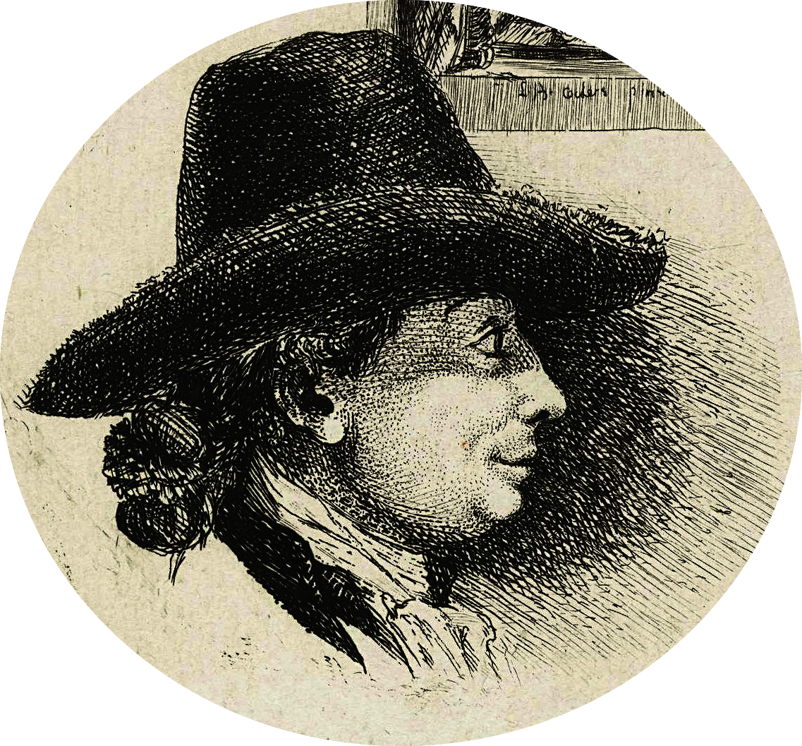 auto-portrait